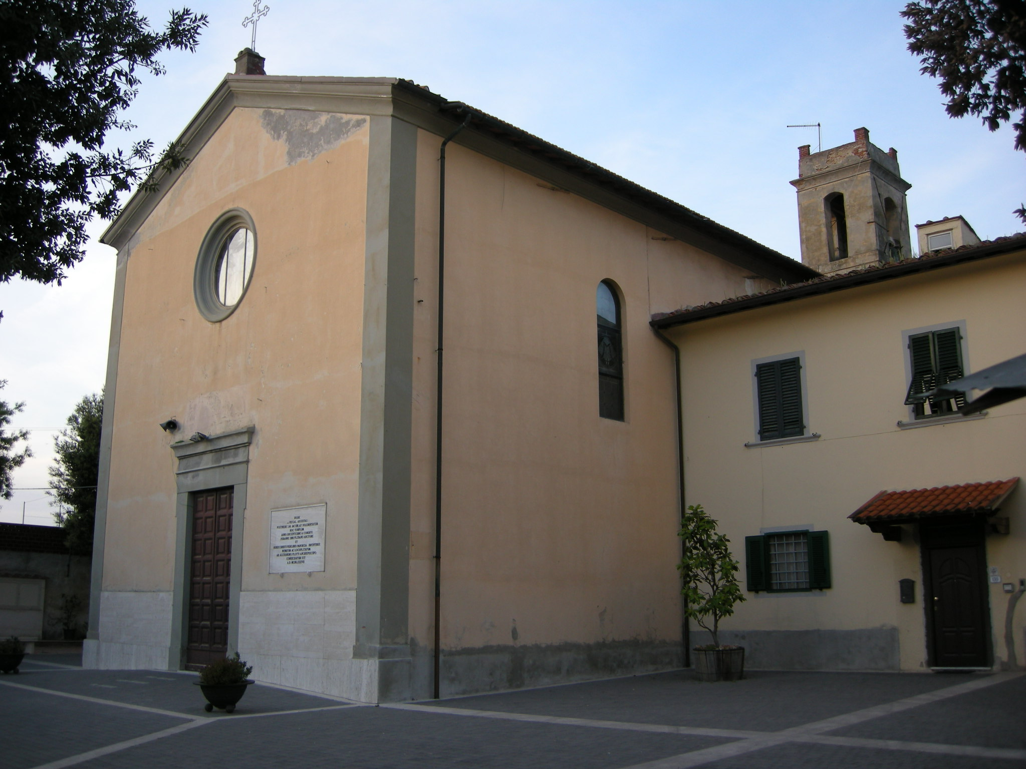 Chiesa di vicarello